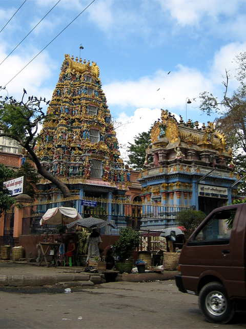 Shri Kali Temple, Little India, Yangon, Yangon Division